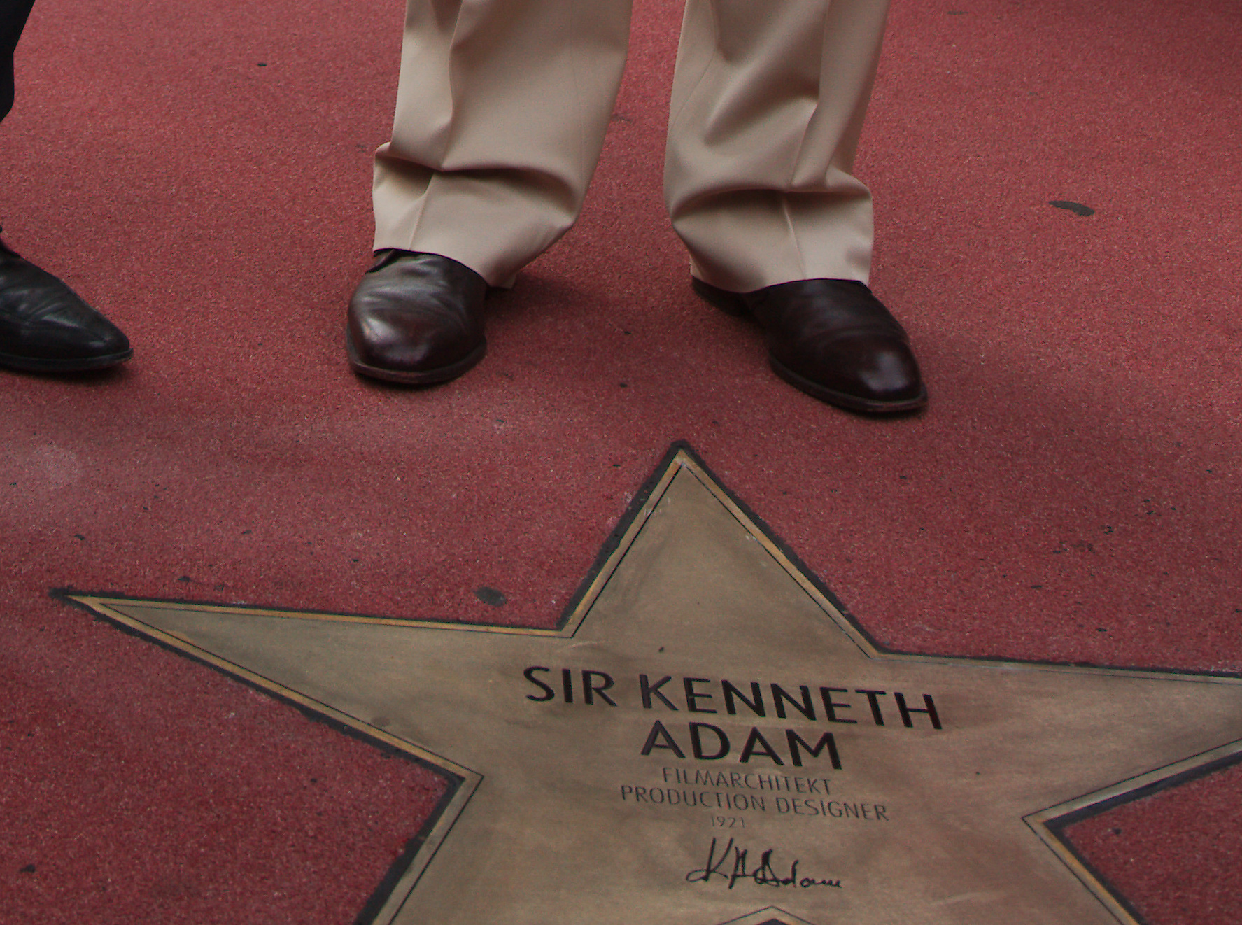 Daneben Bürgermeister Wowereit